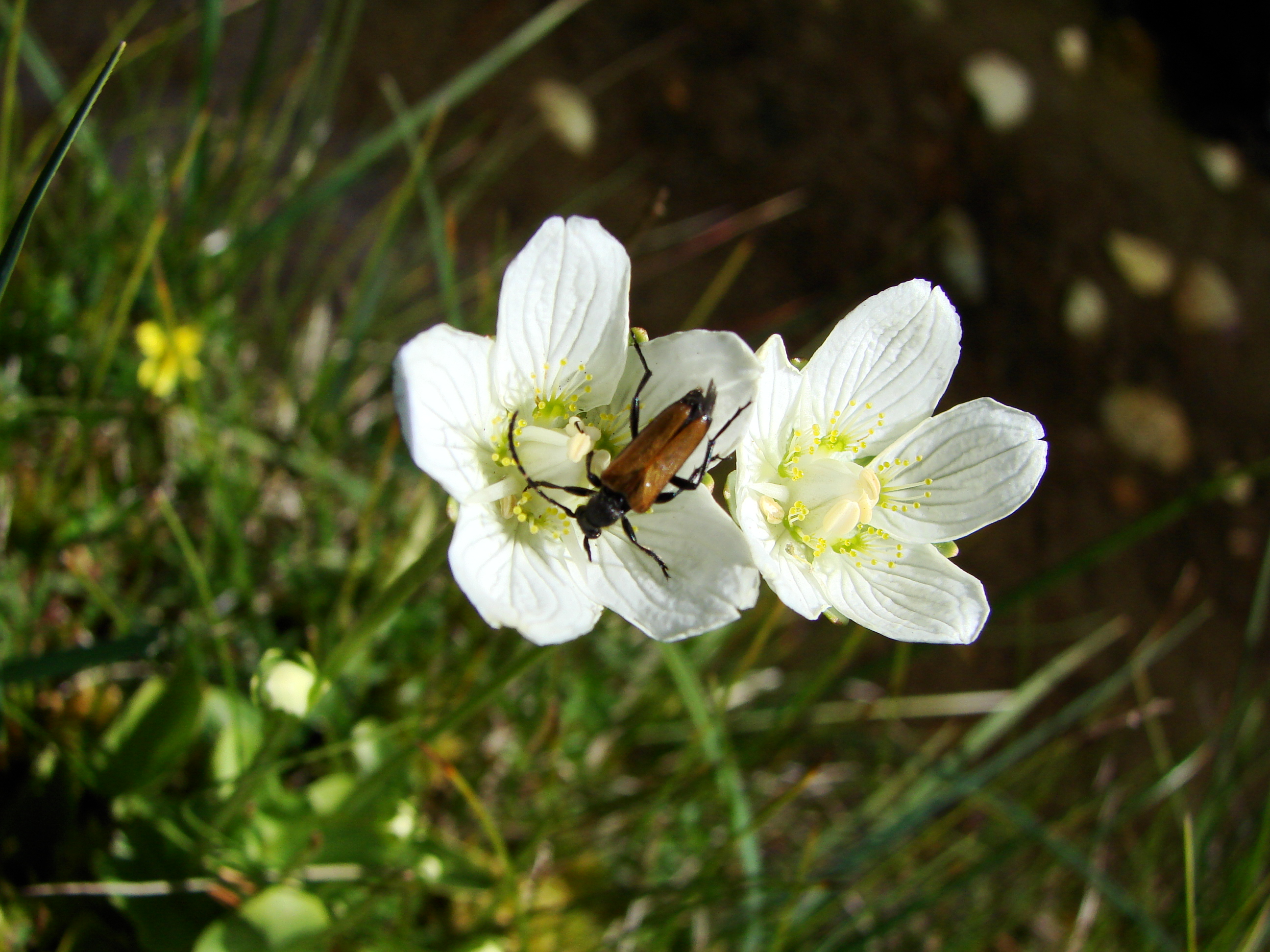 Vallée du Marcadau, Pyrénées françaises, commune de Cauterets, département des Hautes-Pyrénées (France) : Parnassia palustris